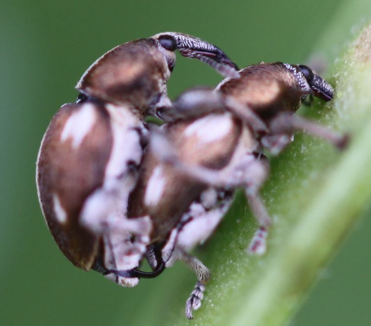 Rüsselkäfer Tychius quinquepunctatus bei der Paarung, am 14. Mai 2018 südlich Mannheim